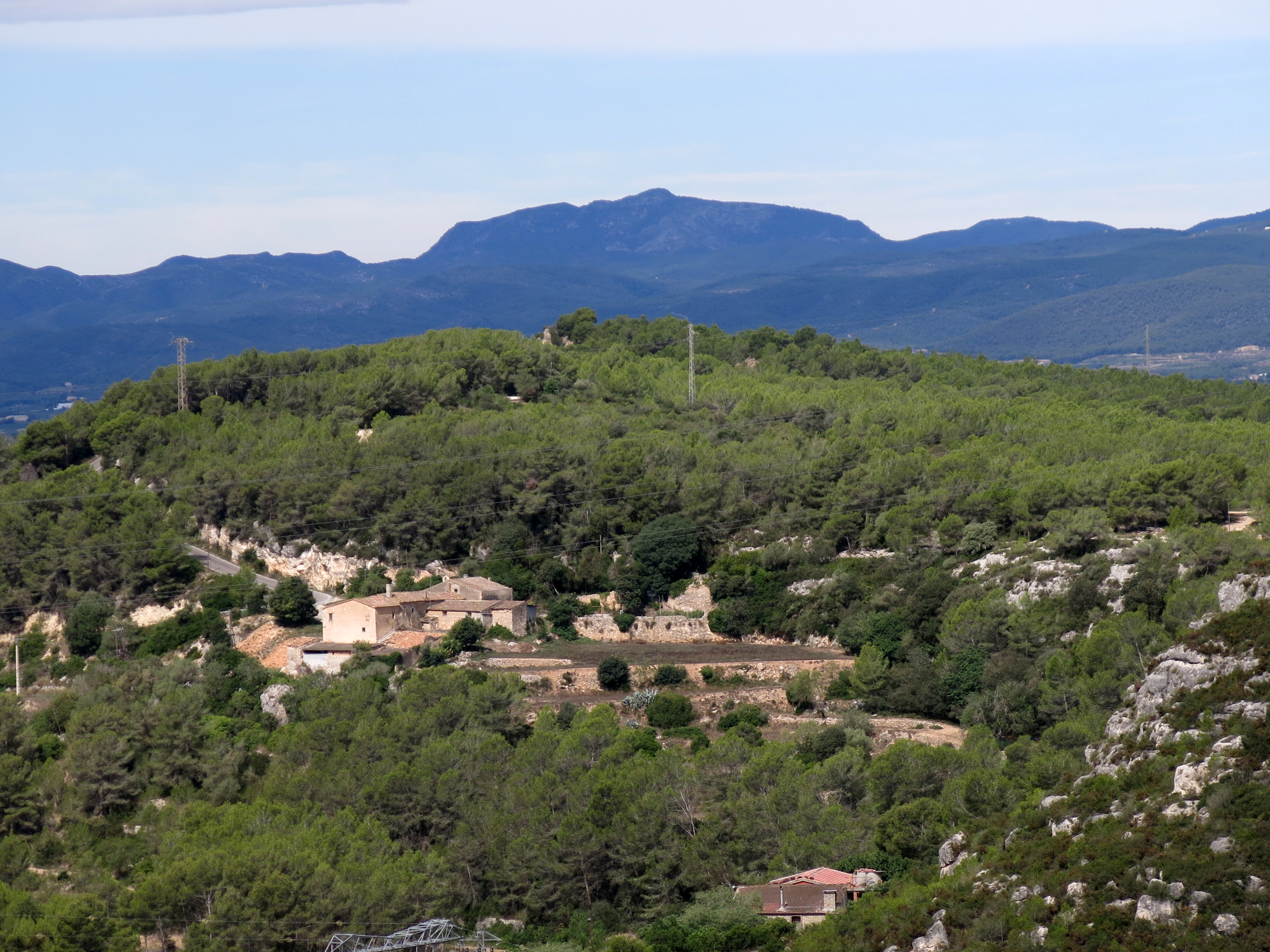 Can Castellví des del jaciment d'Olèrdola, amb la serra del Montmell al fons